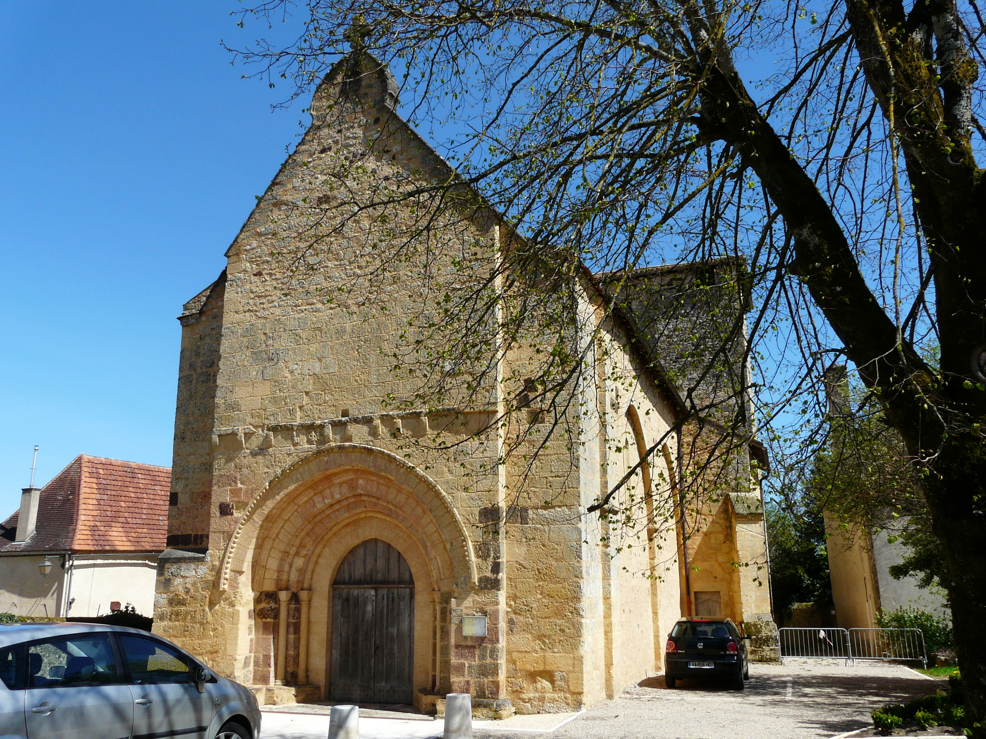 La façade ouest de l'église Saint-Jean-Baptiste, Cendrieux, Dordogne, France.